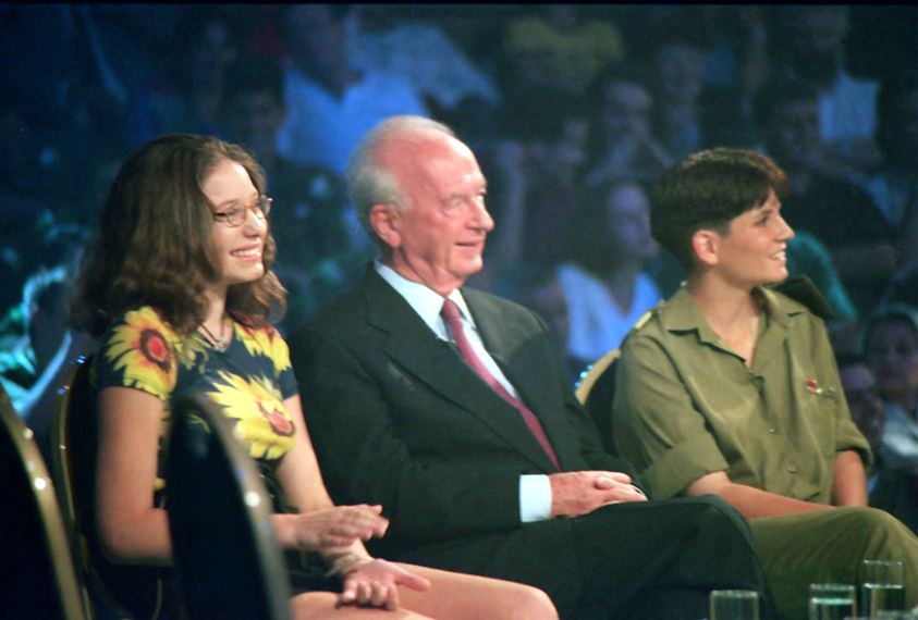 סיון רהב-מאיר ויצחק רבין בעת השתתפותה בשידור חי עם דן שילון